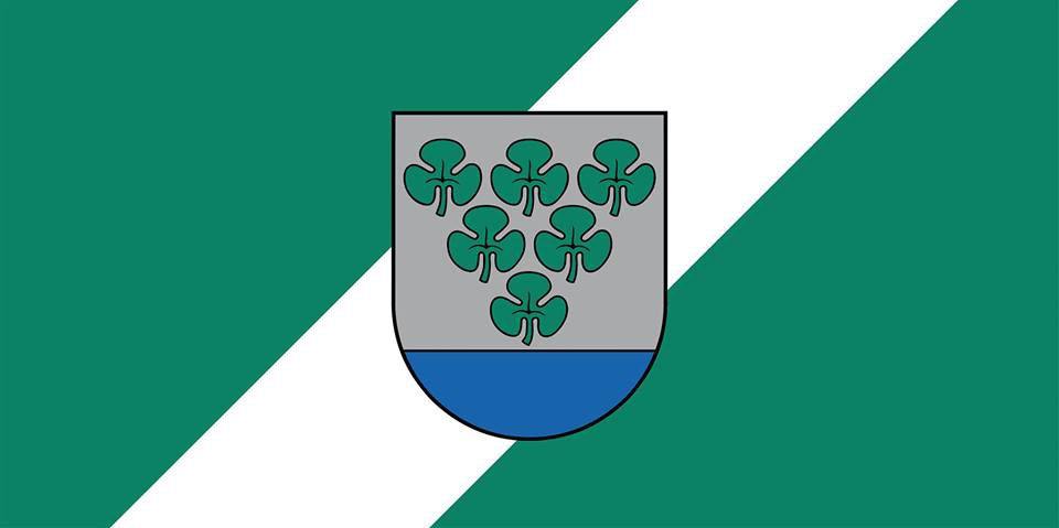 Kārsavas novada karogs